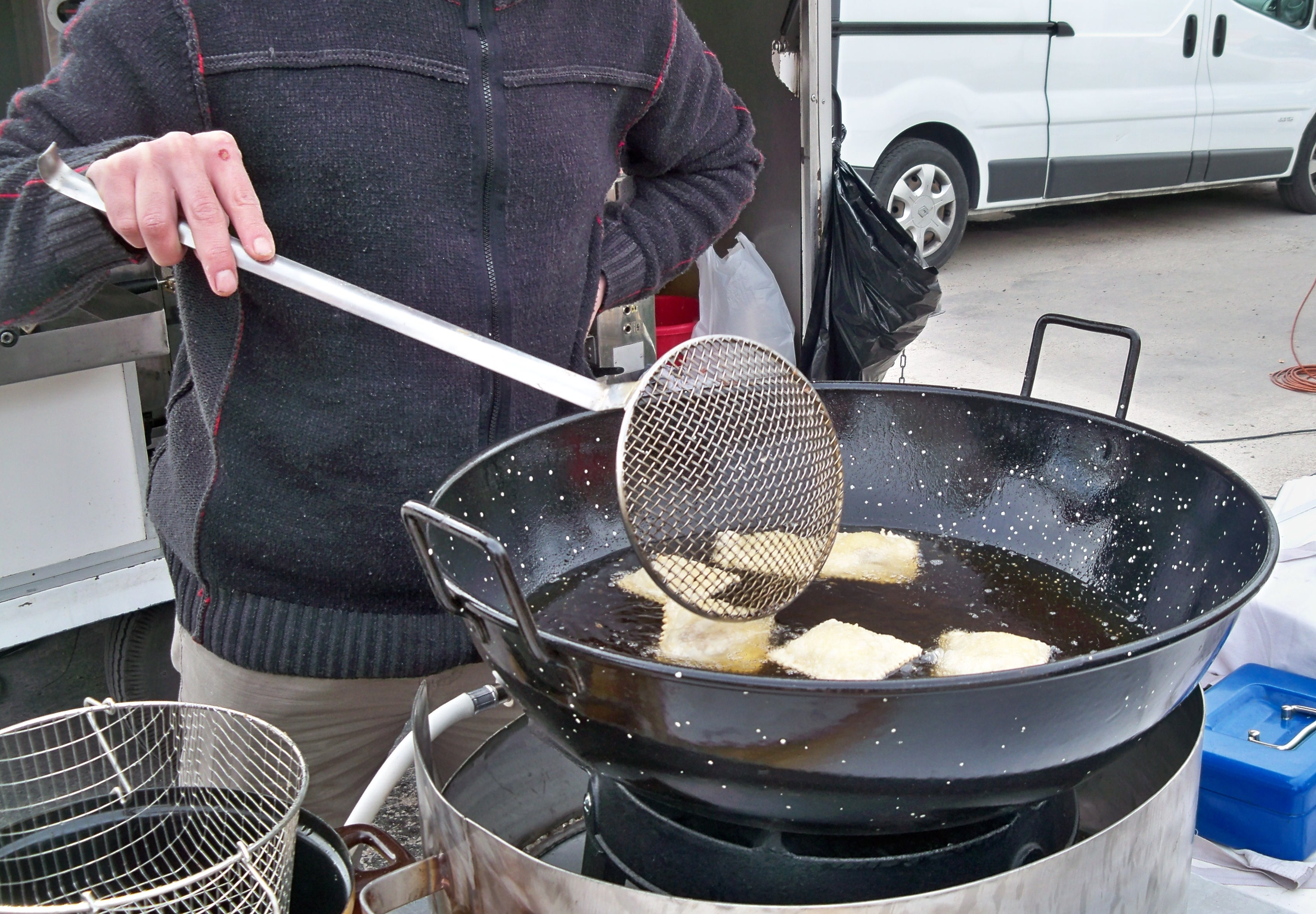 Cuisson des Tourtons, spécialité des Hautes Alpes